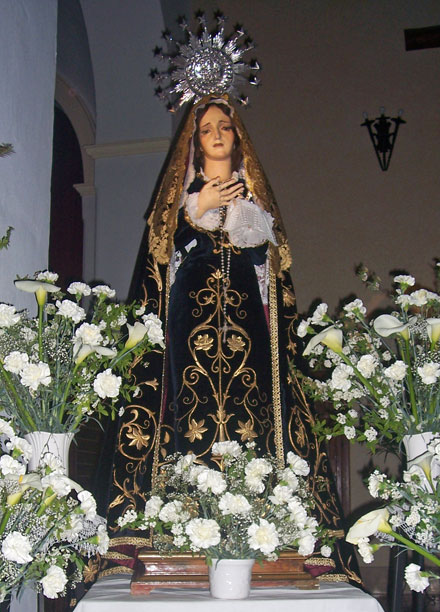 Virgen de los Dolores realizada por Antonio Cano en 1940 para la iglesia de Torrox (Málaga).